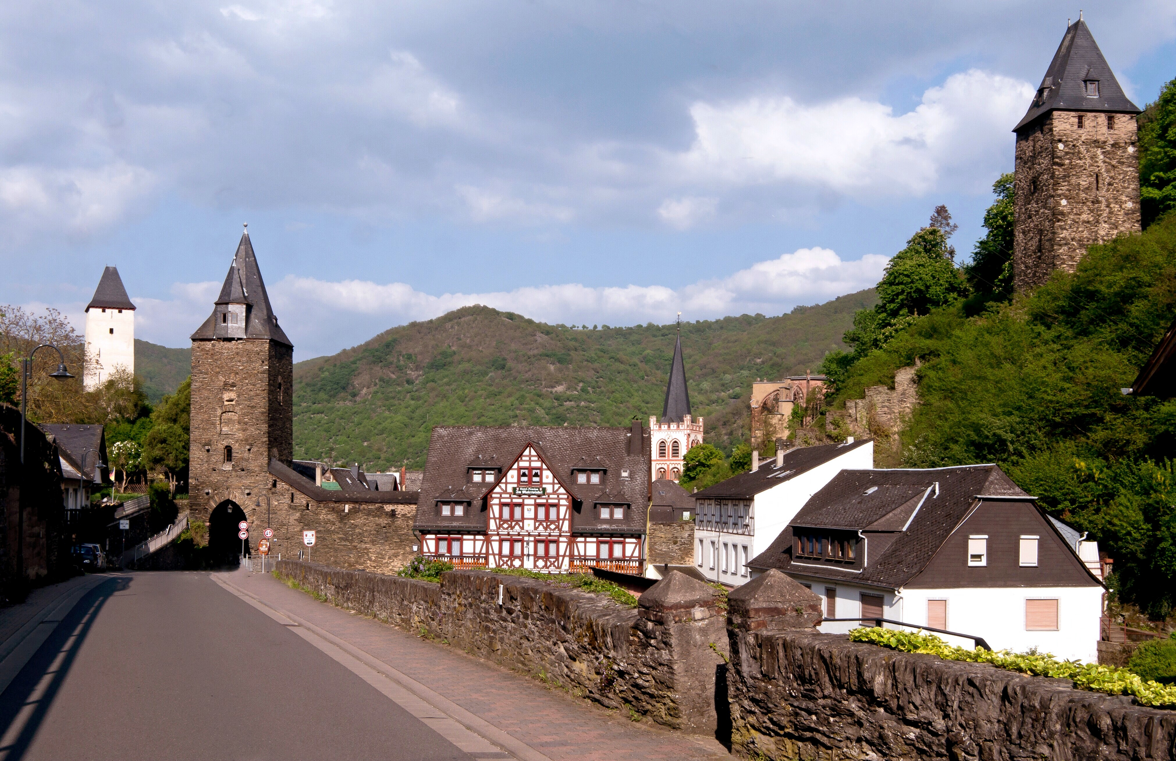 Blick zum Steeger Tor und zum Malerwinkel, Stadtbefestigung.